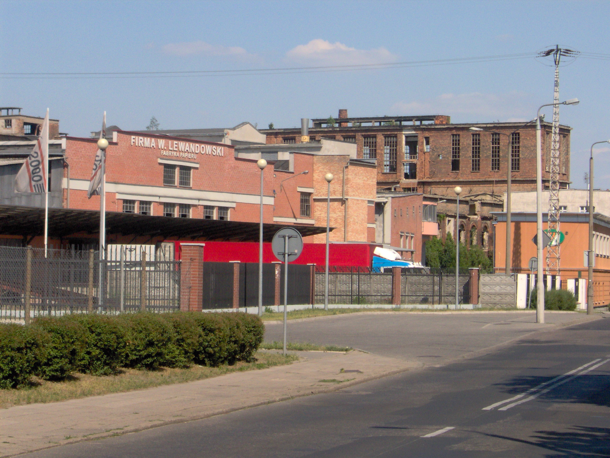 Pozostałości po celulozie (2007 r.)